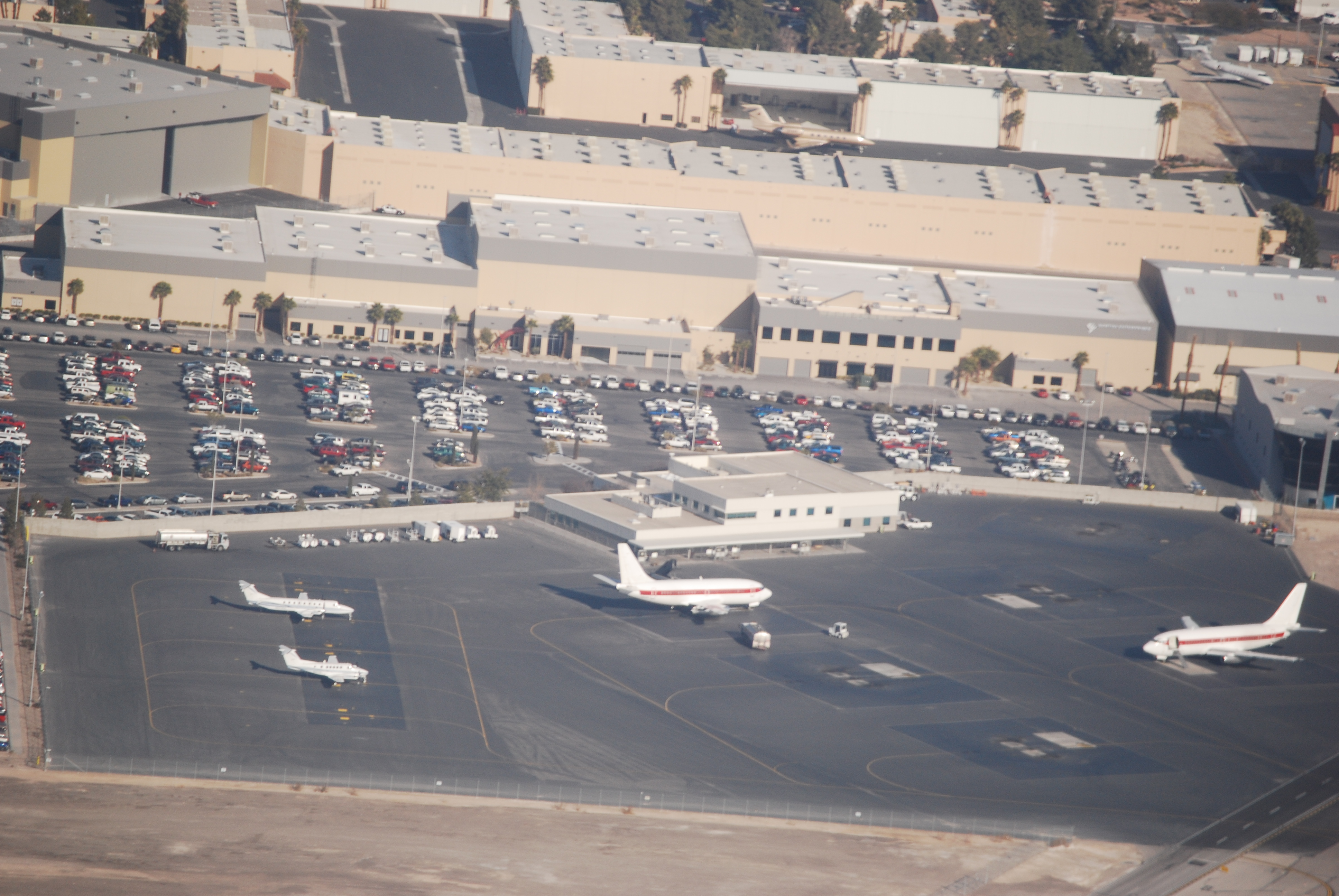 Janet Jets